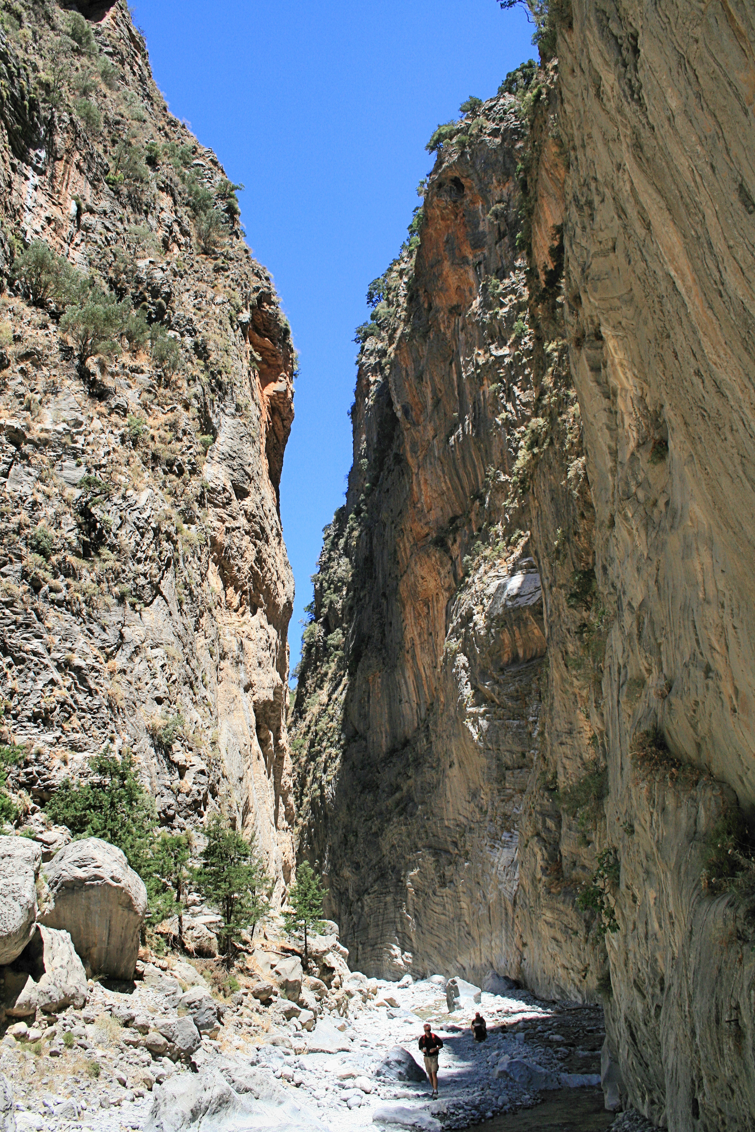 Das 2. Felsentor in der Samaria-Schlucht auf der Insel Kreta